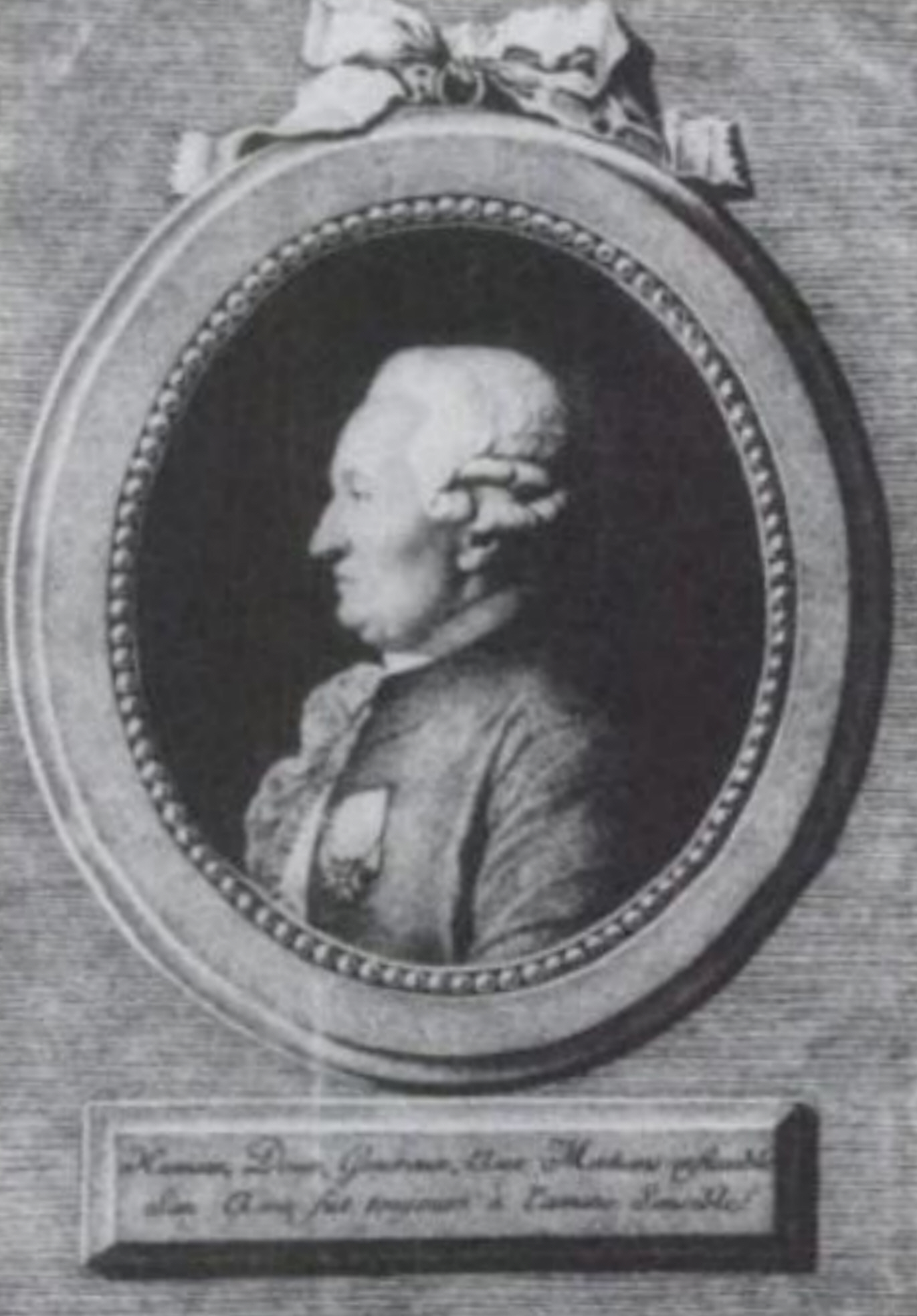 Joseph d'Hémery (1722-1806), oberster polizeilicher Inspektor des Buchhandels in Frankreich